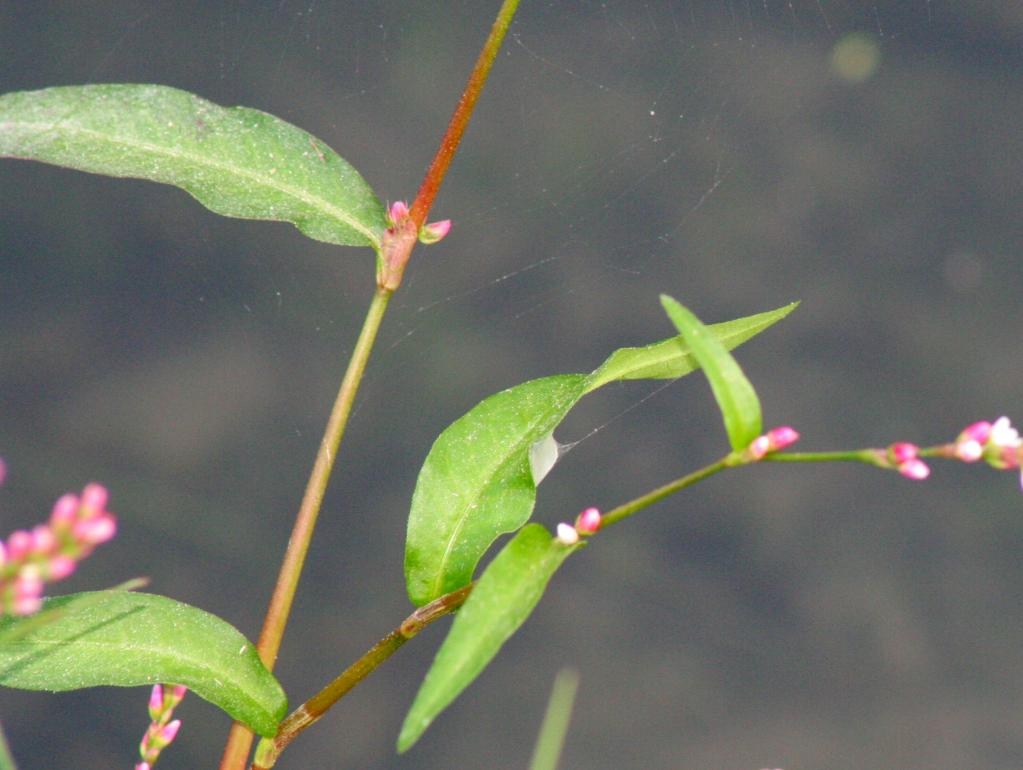 Persicaria_minor (Polygonum minus) - Poligono minore Località Canizzano (TV), quota 10 m s.l.m.